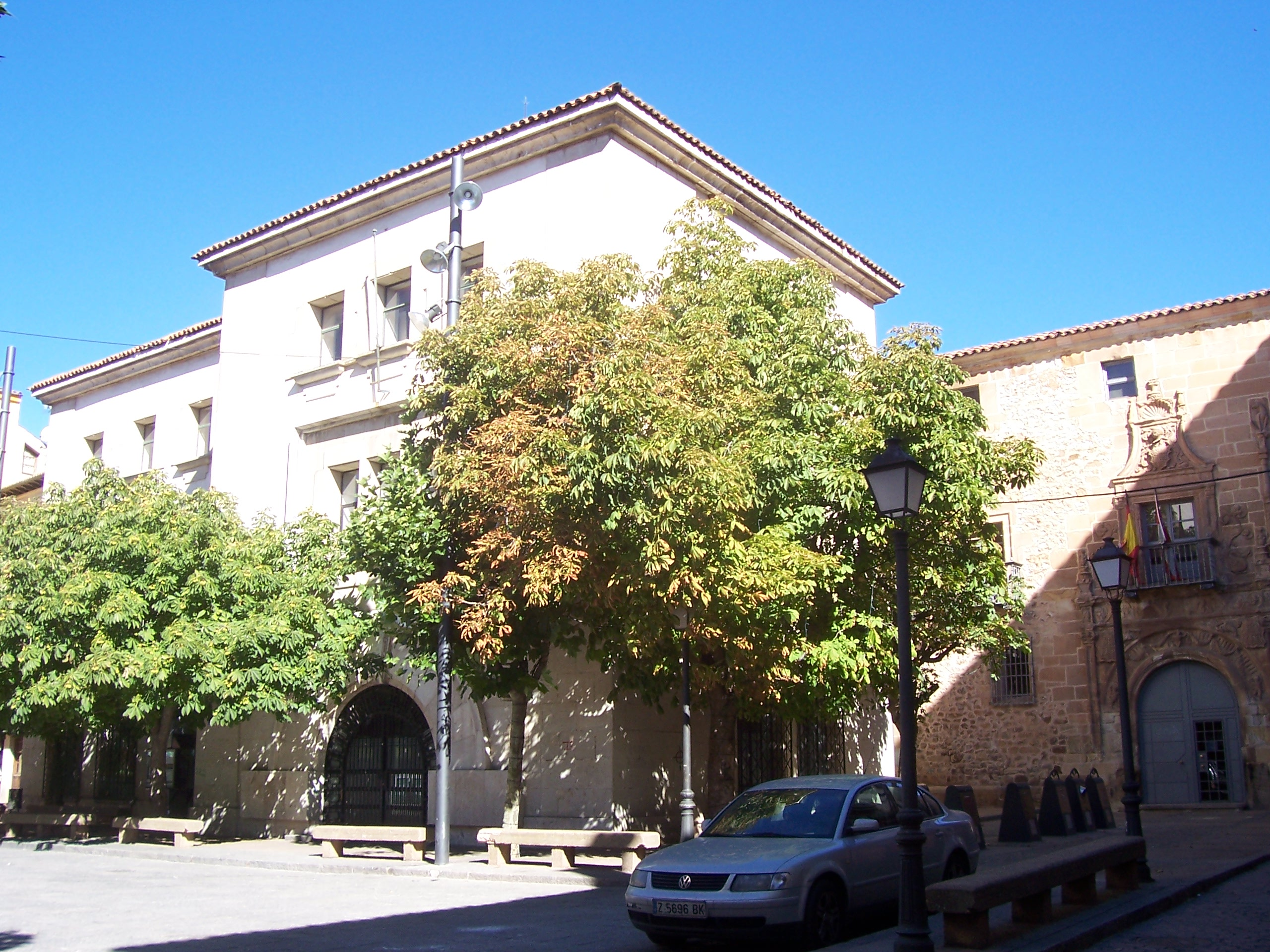 Plaza de San Clemente